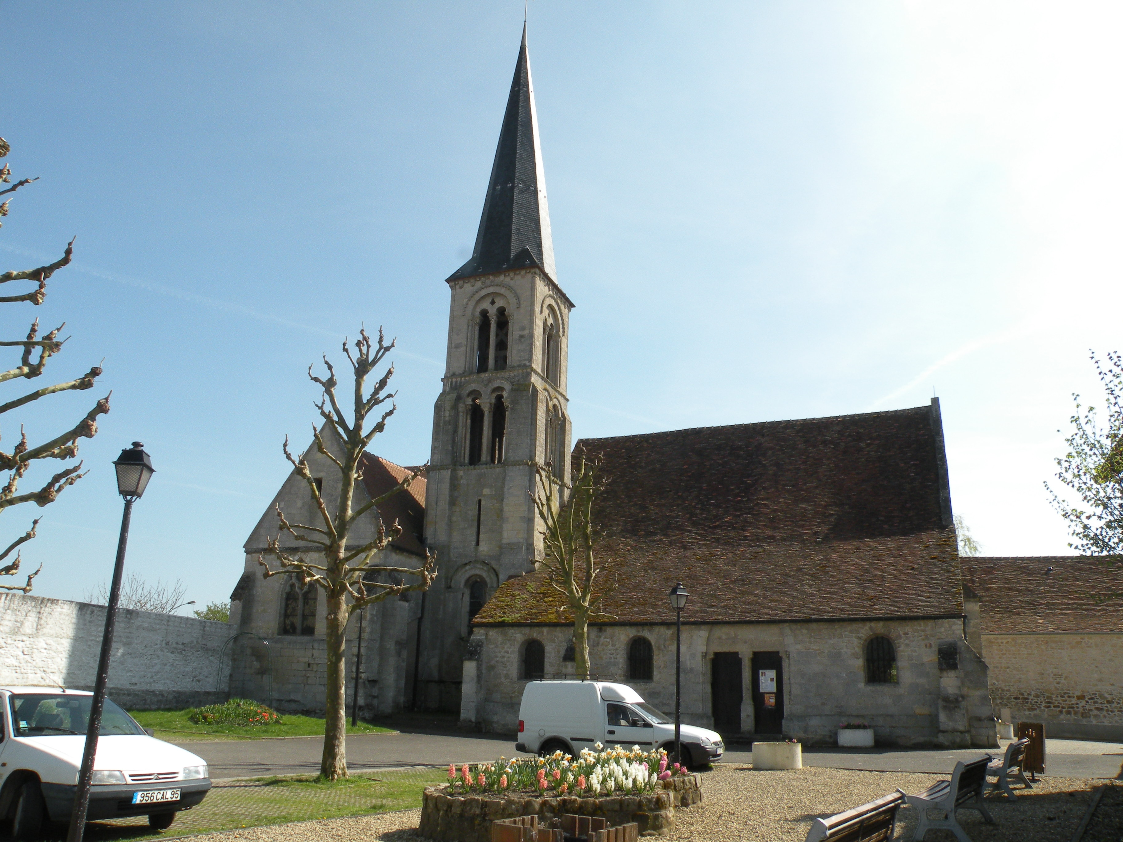 Église de Bruyères-sur-Oise (Val-d'Oise, France)